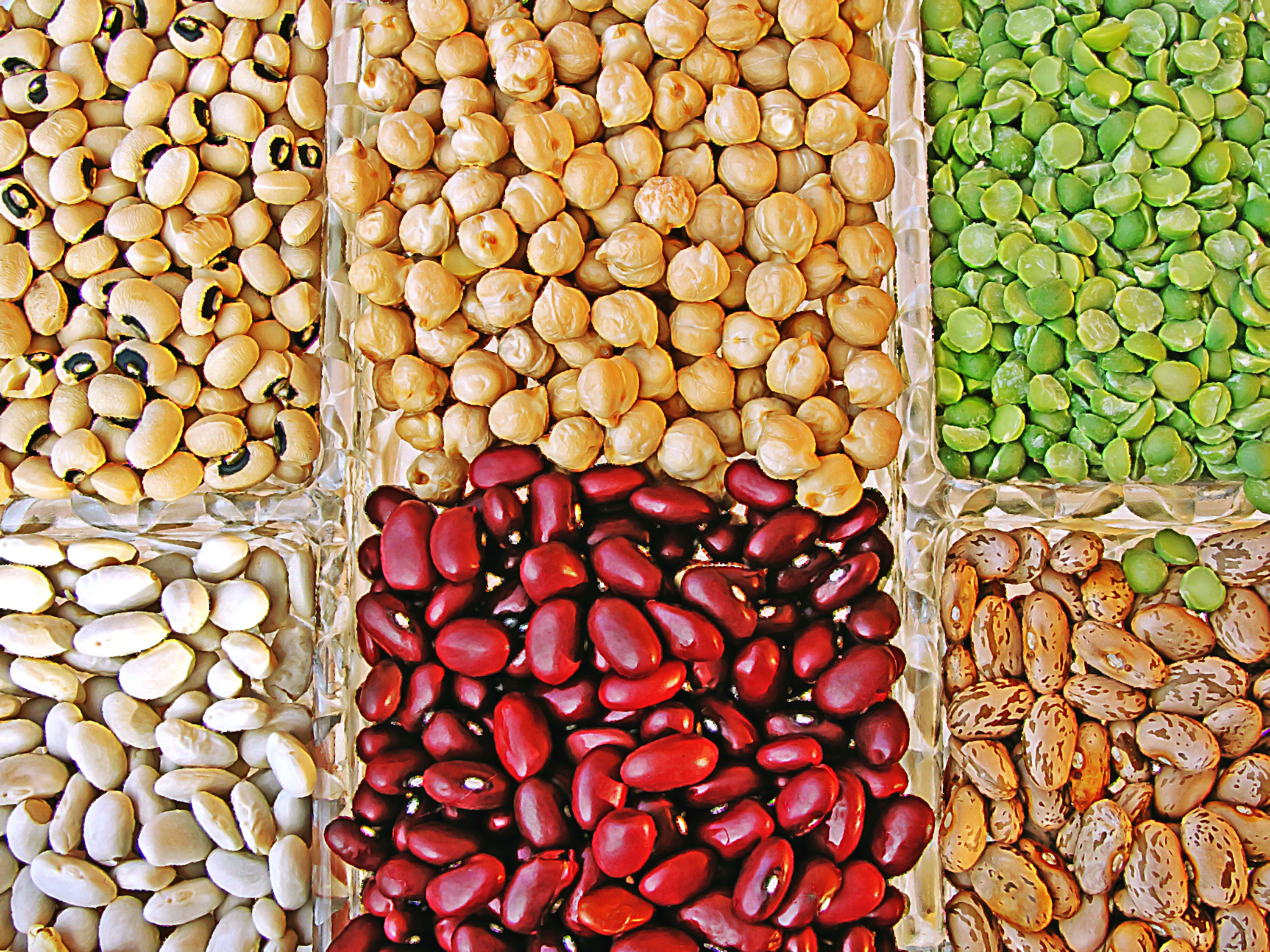 Assortiment de légumineuses.